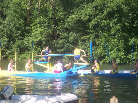 Joutes méthode alsacienne